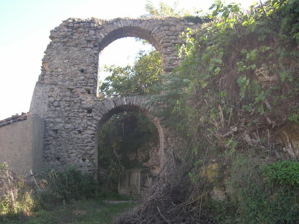 Località Battandieri: resti di un antico acquedotto.